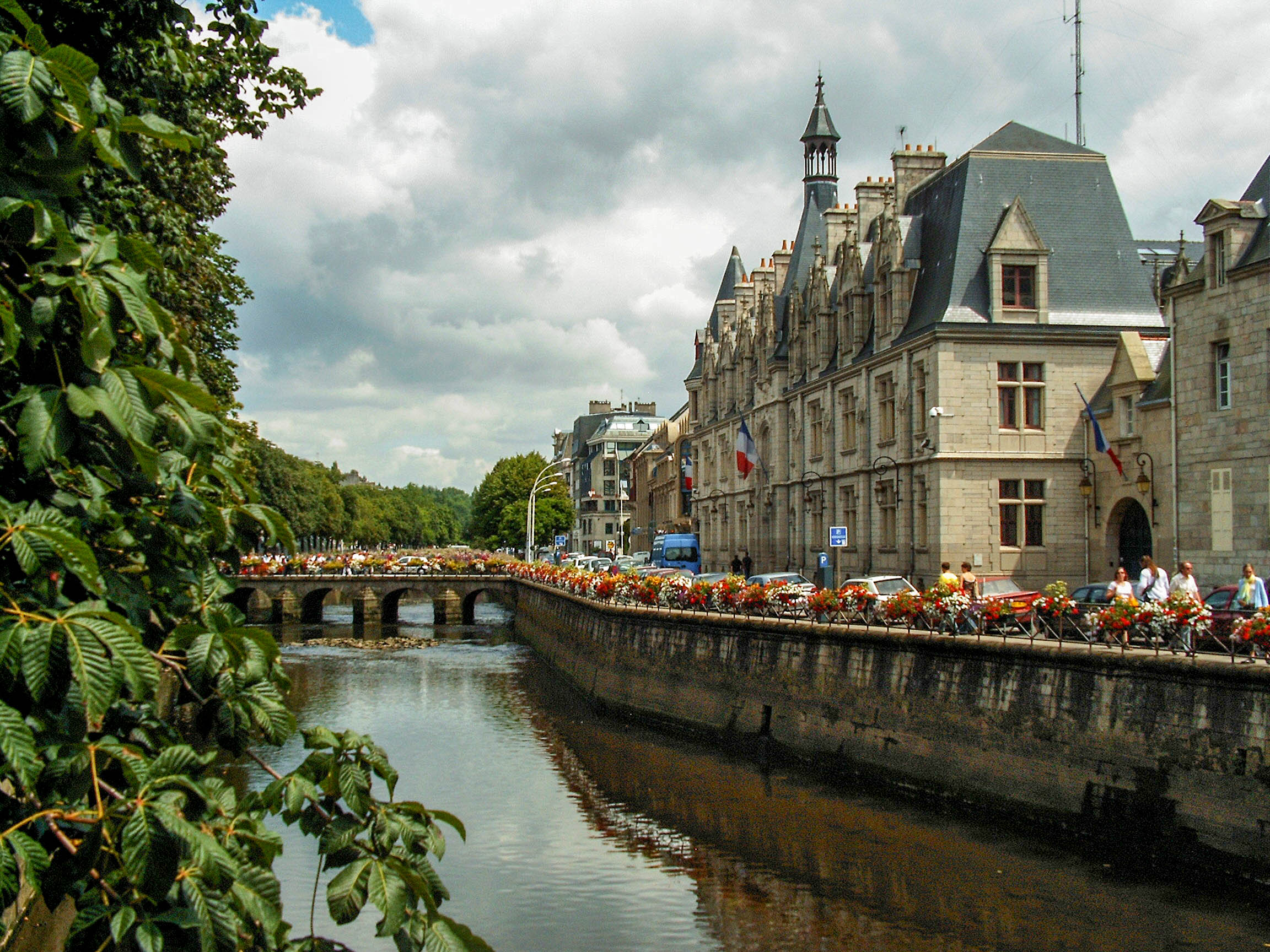 Quimper : Brücke über den Odet